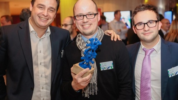 Vincent Trevisan, Associé Deloitte Fiduciaire Liège, Nicolas Poelst, Co-founder et Responsable Commercial de X-RIS ; Gilles Spirlet, Consultant chez Deloitte Fiduciaire Liège.